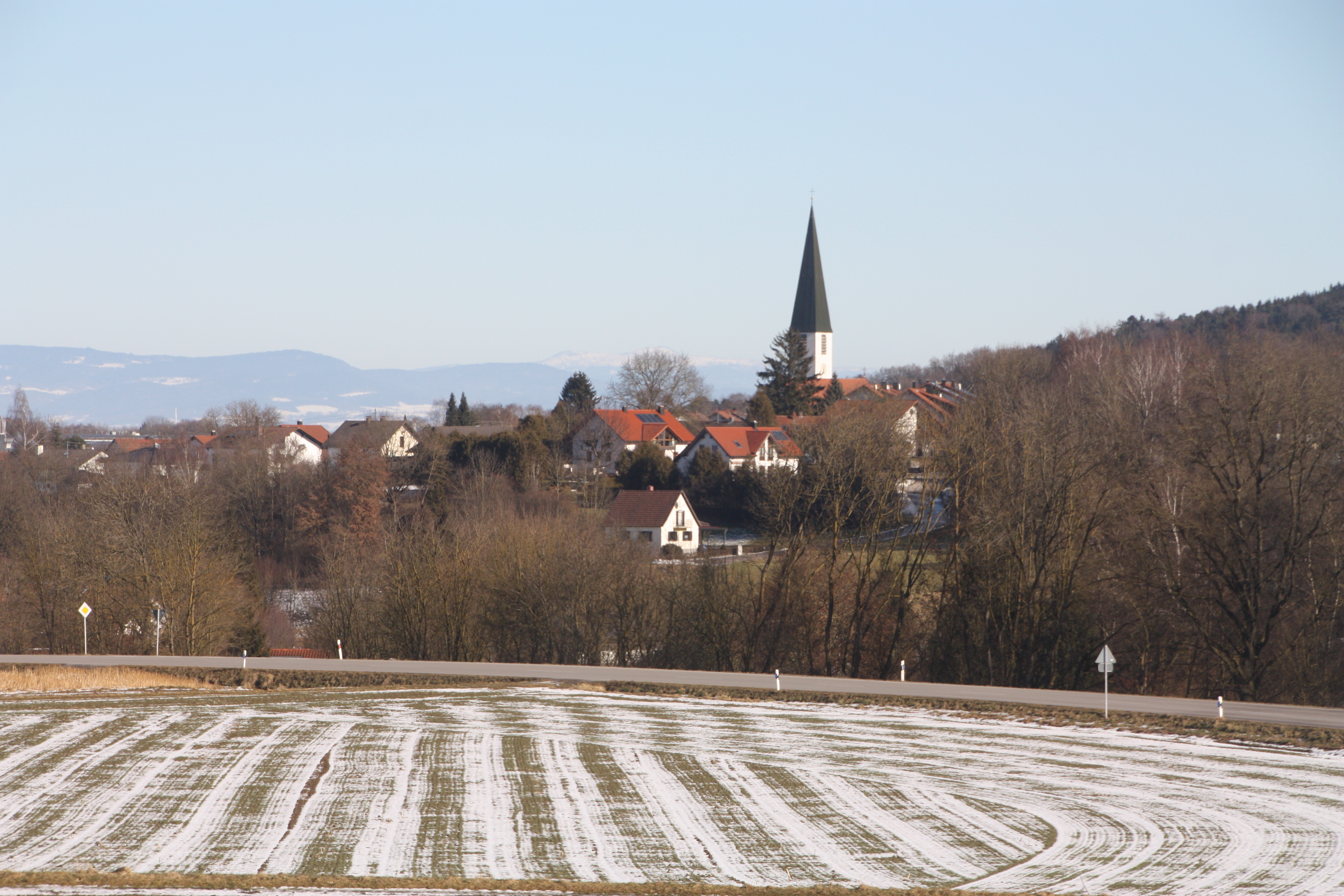 Mamming